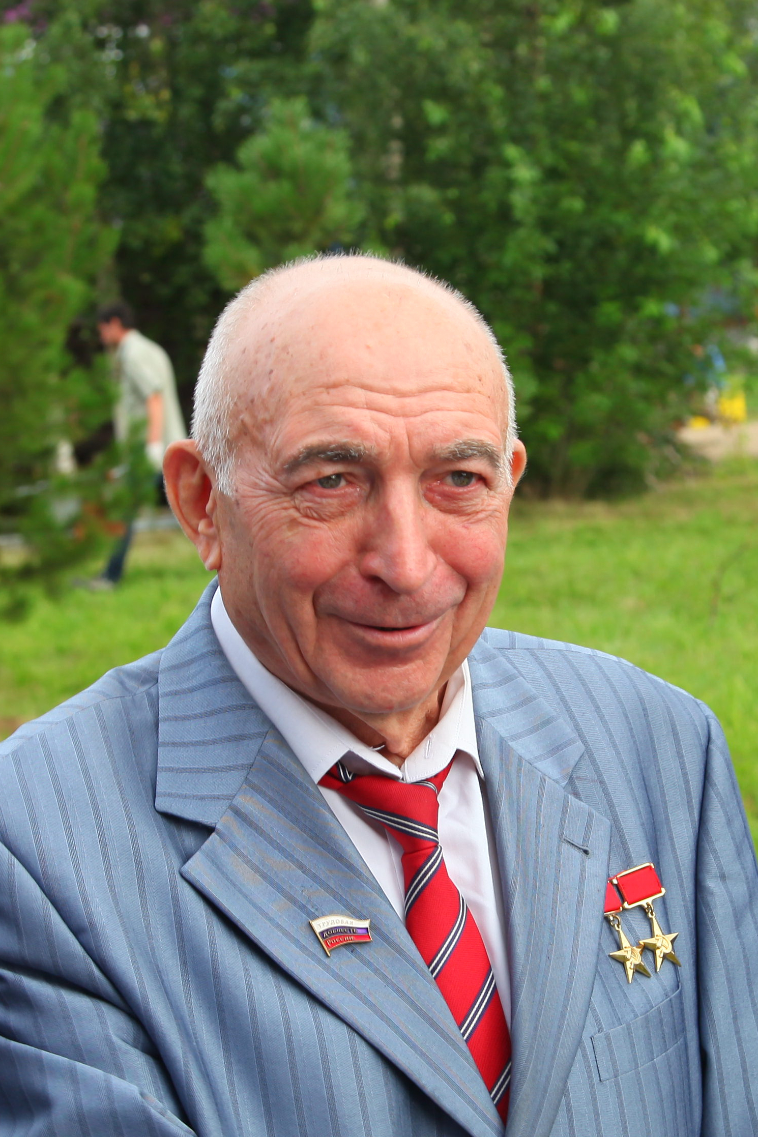 Герой Социалистического Труда Владимир Михайлович Ярыгин